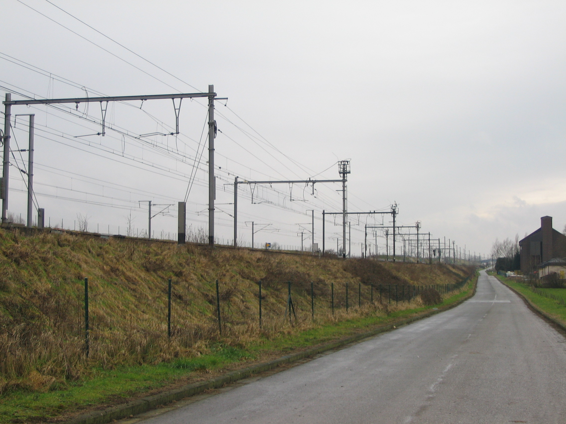 La LGV 1 vers Ghislenghien, province de Hainaut. Elle jouxte la ligne classique, au 1er plan, sur une dizaine de km entre Enghien et Ath (axe Bruxelles-Tournai-Lille).